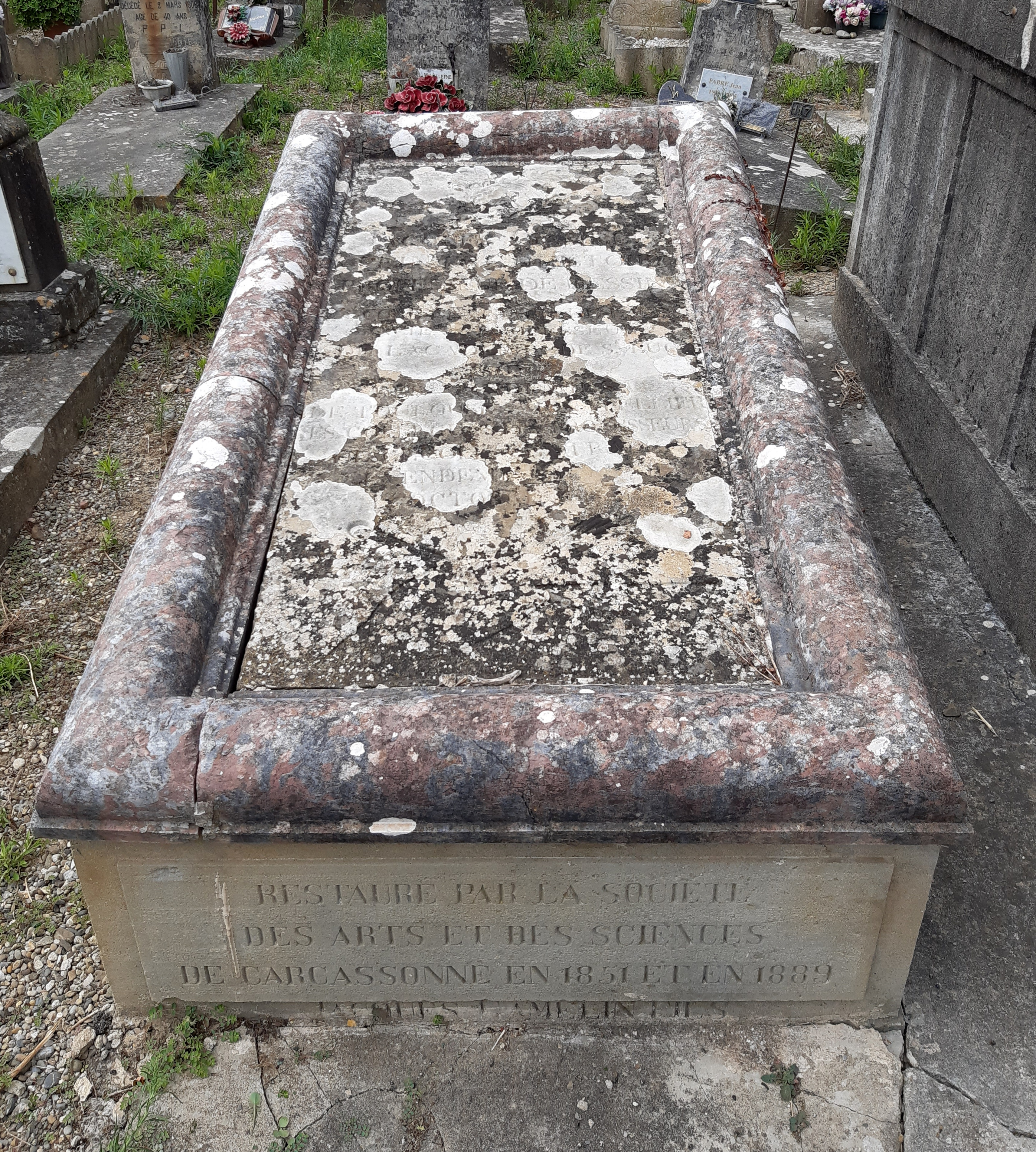 La tombe du peintre Jacques Gamelin au cimetière Saint Michel à Carcassonne.